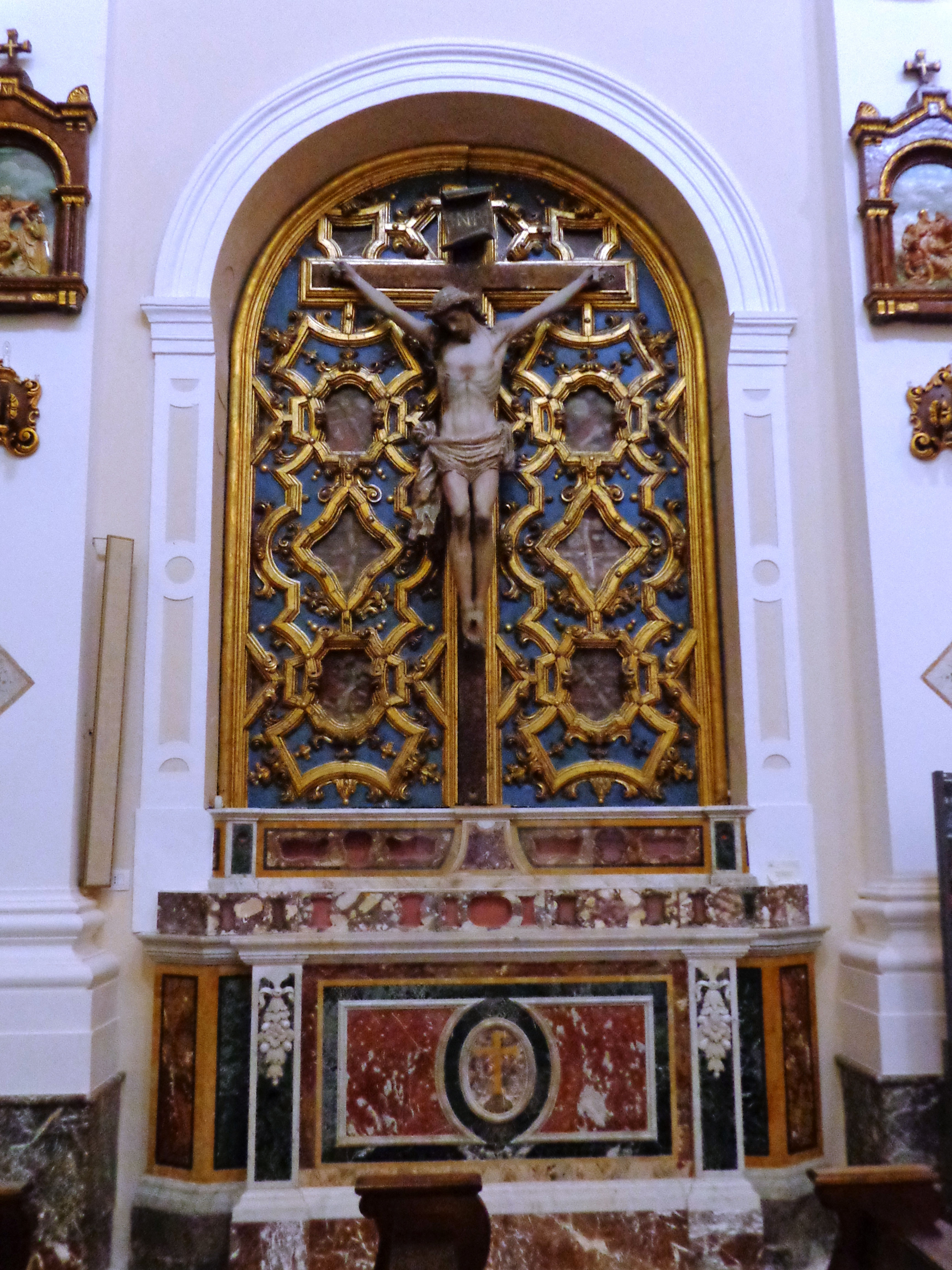 Cattedrale Patti 12